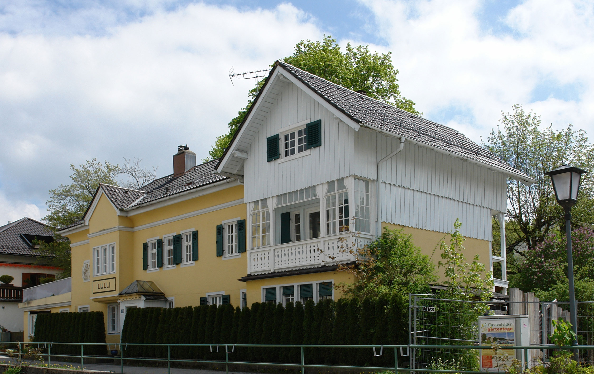 Feldafing: Haus Lulli, Bahnhofstraße 31. 1923 nach Plänen von Erdmann Hartig errichtet This is a photograph of an architectural monument.